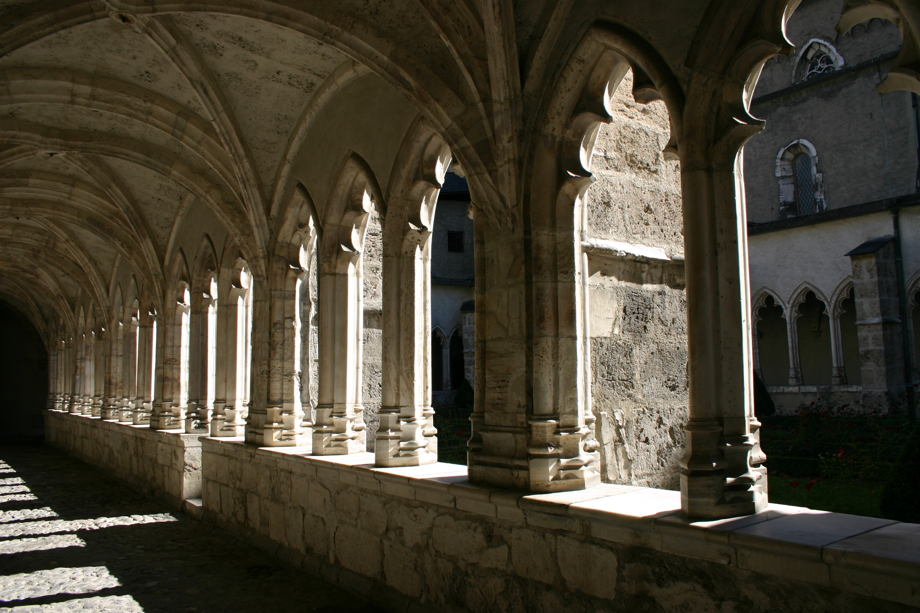 Les Cloîtres de Saint Jean de Maurienne Licensing Auteur : Modesto Alexandre